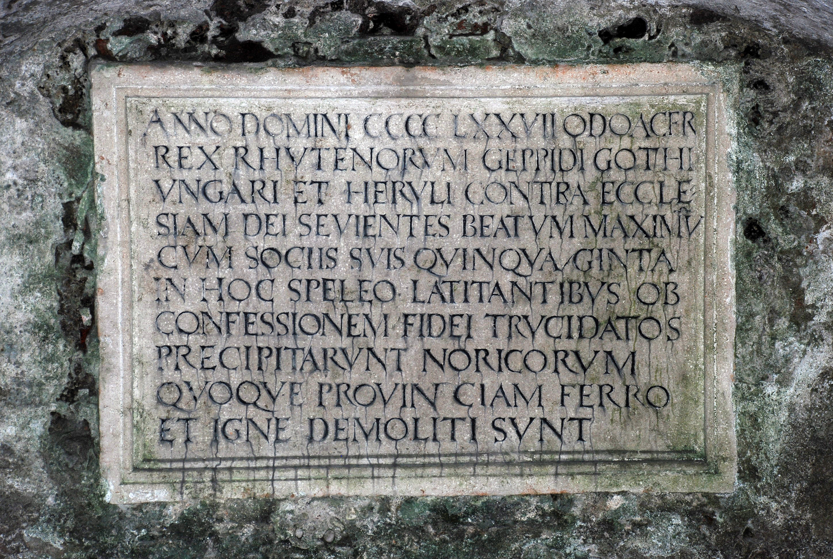 Schild in der Maximuskapelle über die Martyrerlegende in den Katakomben des Petersfriedhofes in Salzburg